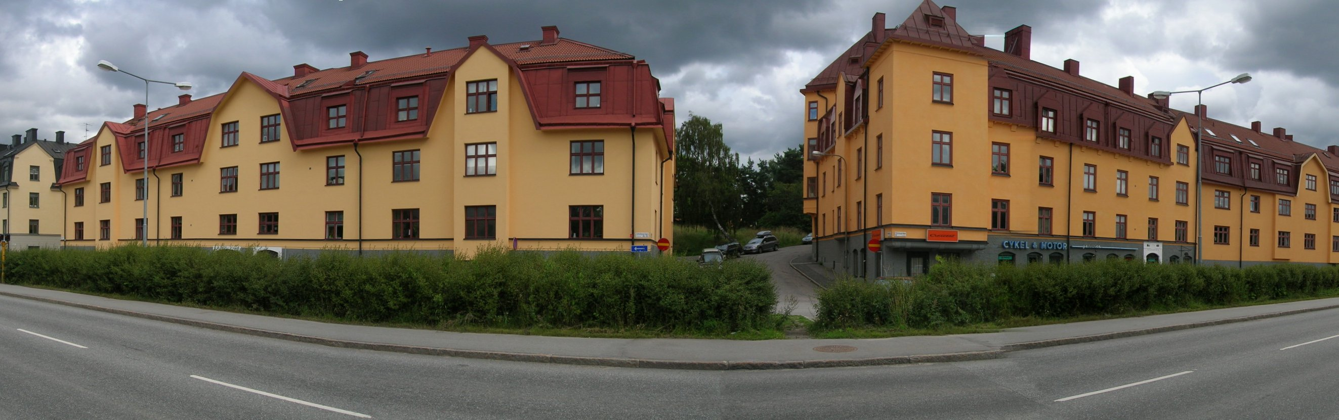 Kvarterena Cypressen och Järneken på Tellusborgsvägen i Midsommarkransen uppfördes på 1910- och 1920-talet, Stockholm.